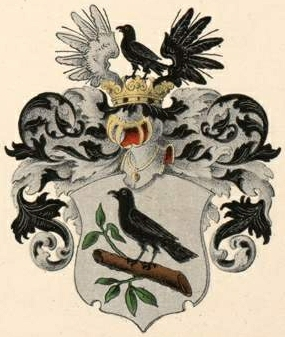 Klebecki suguvõsa aadli- ja parunivapp